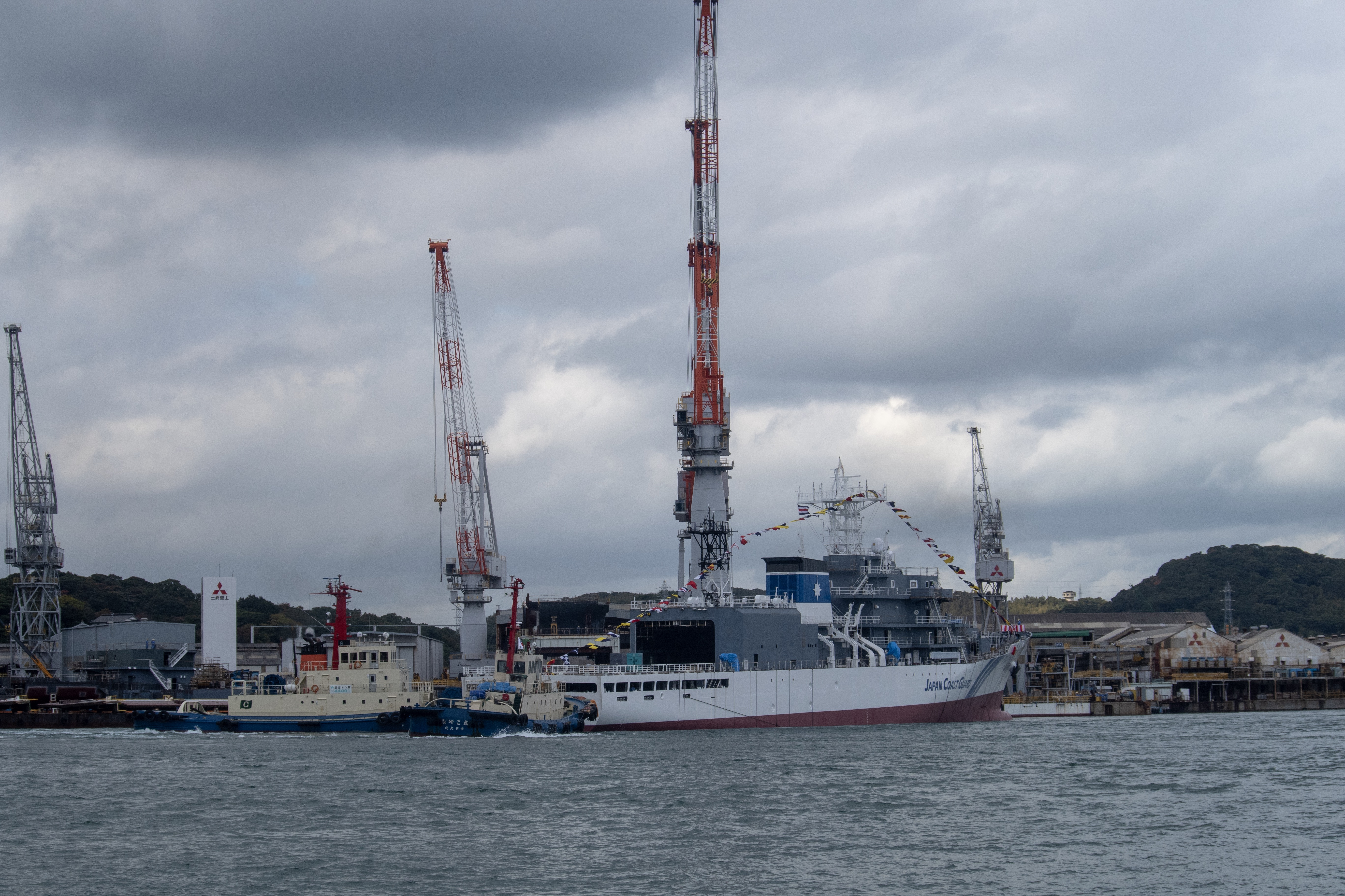 2018年11月9日、三菱造船(山口県下関市)にて進水した巡視船みずほPLH-41